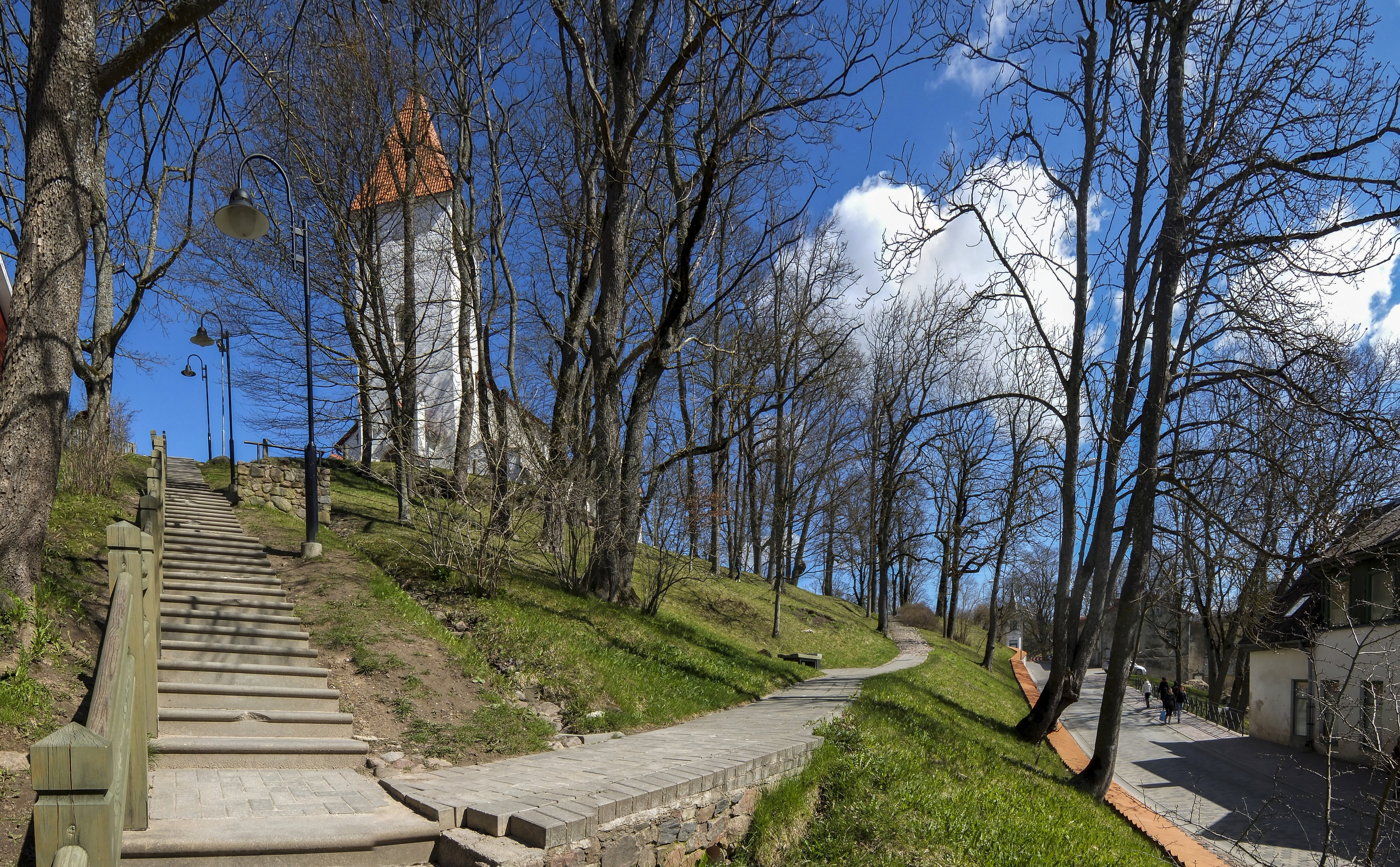 Talsu luterāņu baznīca, Talsi, Baznīcas laukums 4